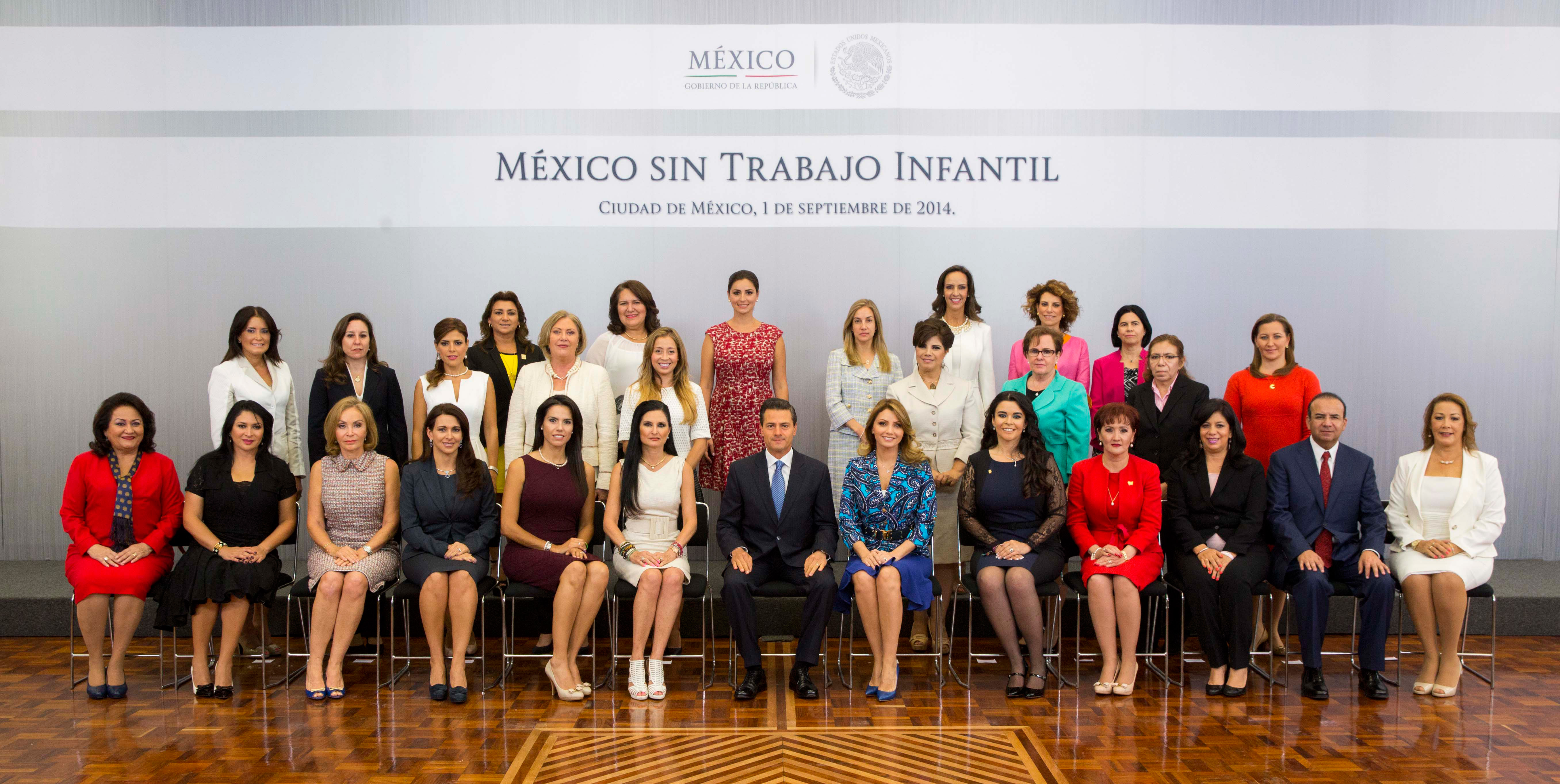 Presidente de México Enrique Peña Nieto y la Presidenta del DIF Nacional Angélica Rivera de Peña, con la asistencia del Gabinete Presidencial, Diputados, Senadores, representantes de organismos no gubernamentales y las presidentas de los DIF Estatales de la república mexicana en entrega de propuesta como iniciativa preferente a la Cámara de Senadores, un proyecto de Ley General para la protección de las niñas, los niños y adolescentes.